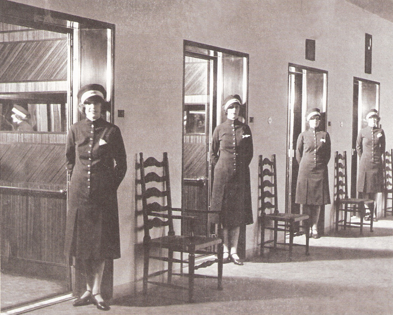 Stockmannin hissitytöt vuonna 1930.